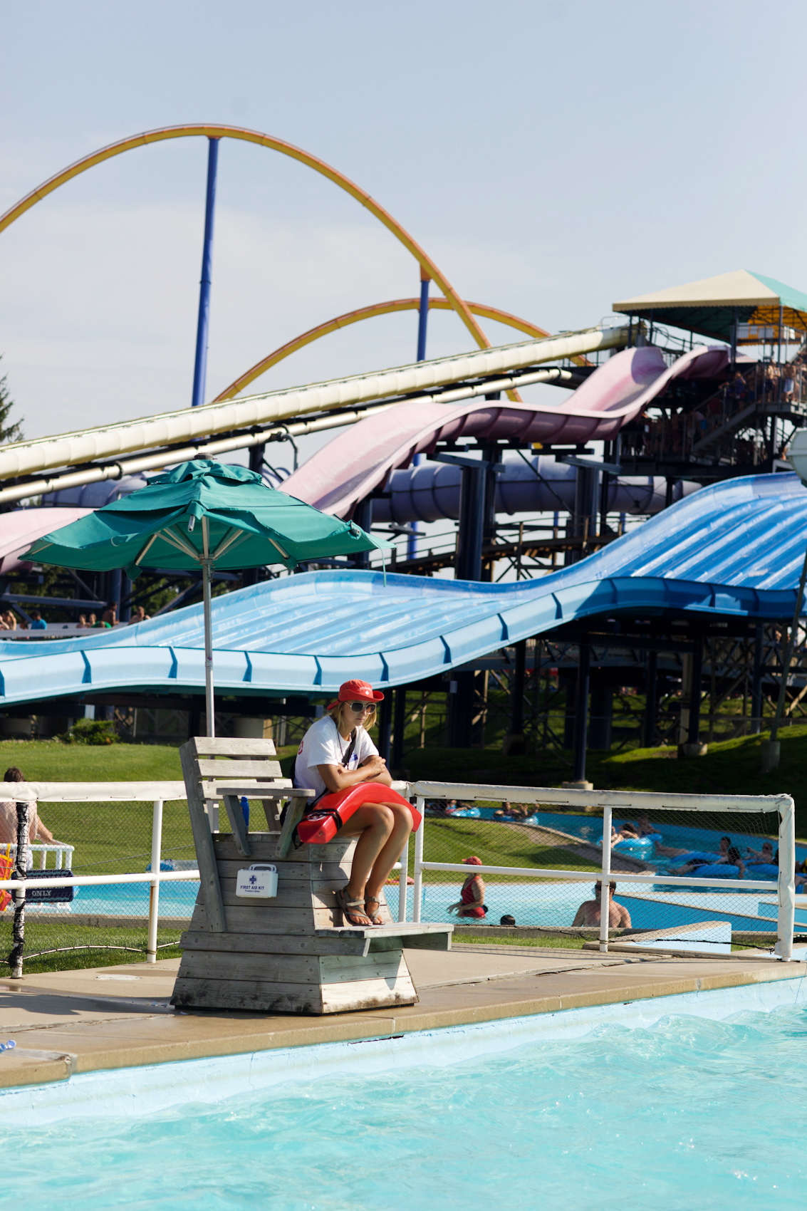 2011, Canada. Toronto.